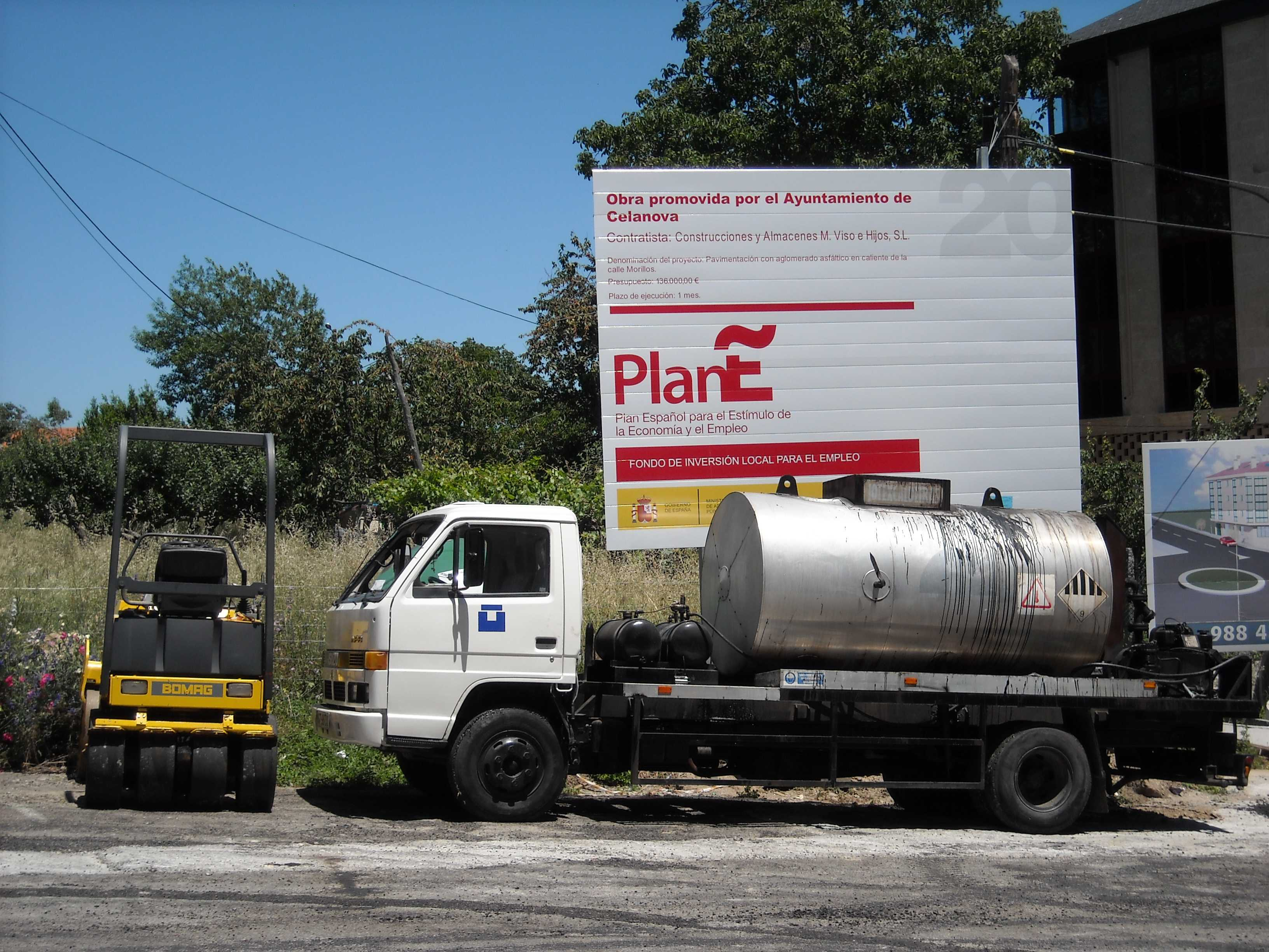 Plan E. Pavimentación de una calle en Celanova.